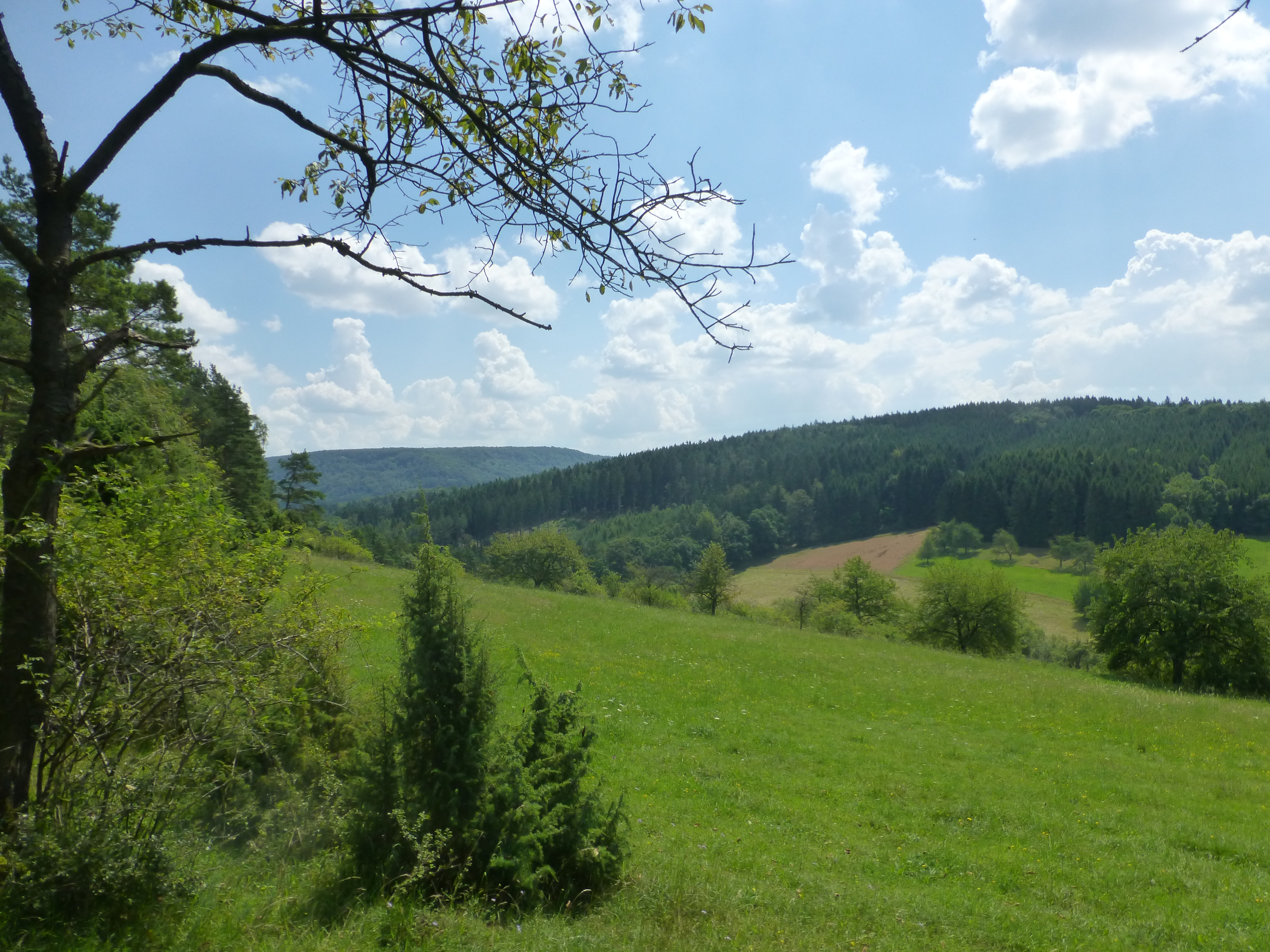 Aussicht vom Hasenwinkel über das Schierbachtal nach Südost (rechts Ausläufer des Höhberges und im Hintergrund der Stein)